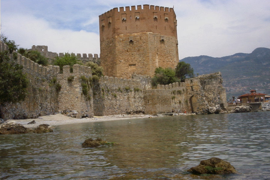 Der Rote Turm von Alanya